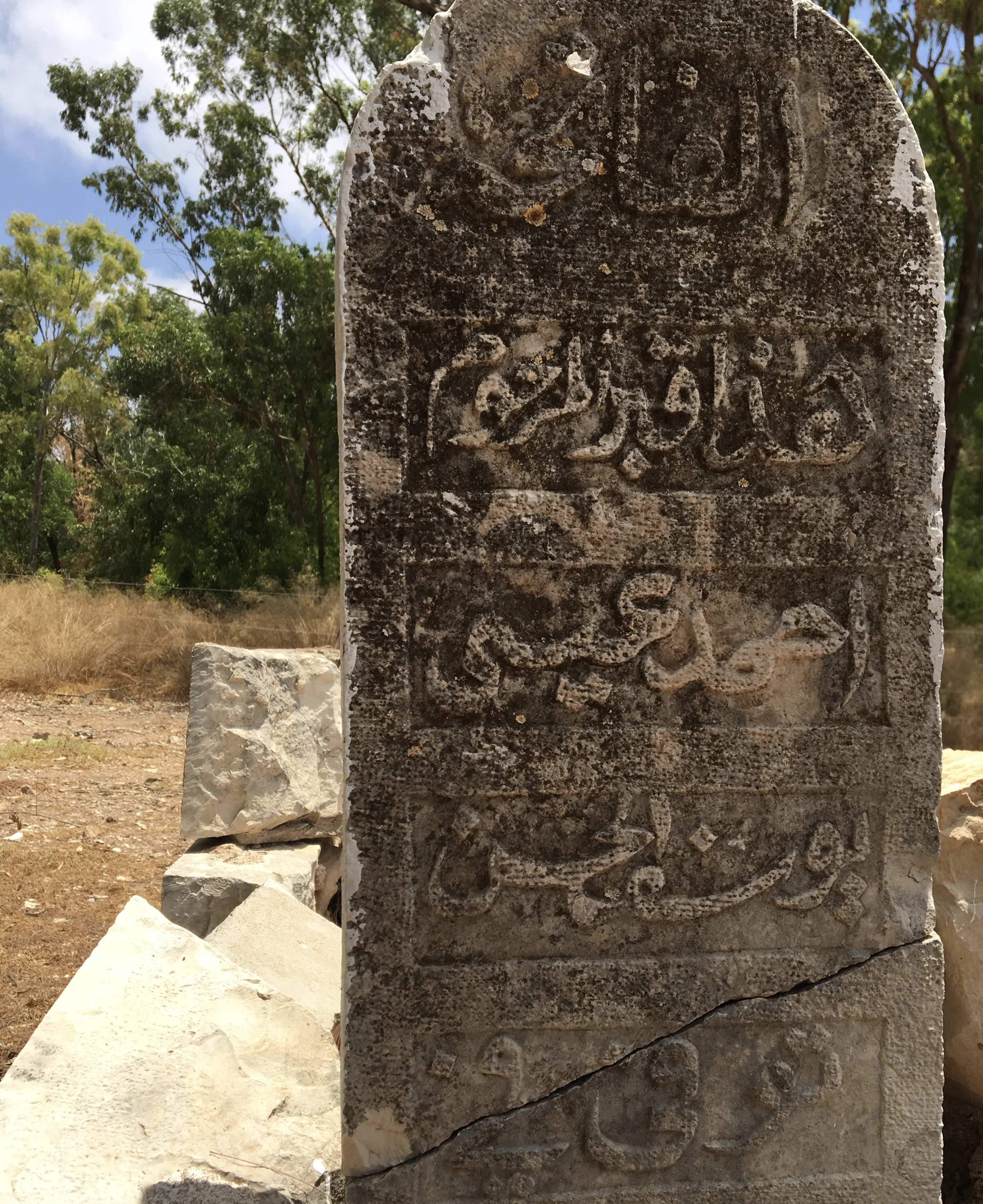 الكويكات- فلسطين